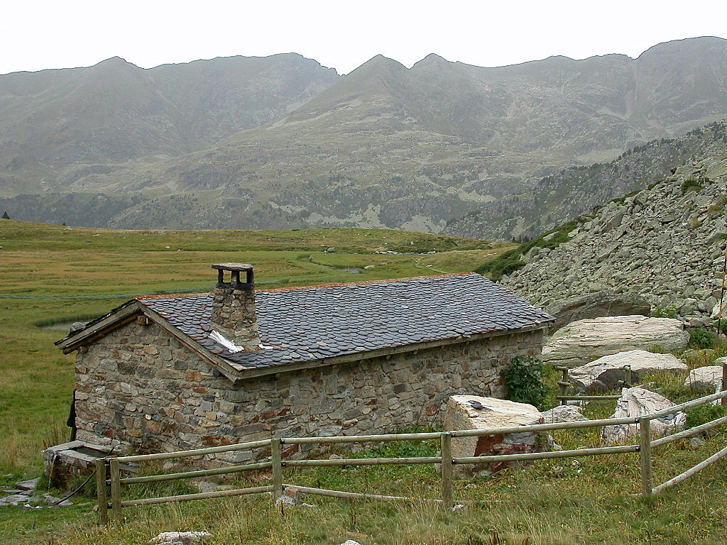 Refuges Andorre Refugi de Siscaró